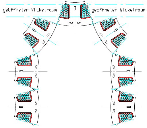 Darstellung des geöffneten Wickelraumes für die Flyerwickeltechnik bei Zahnketten